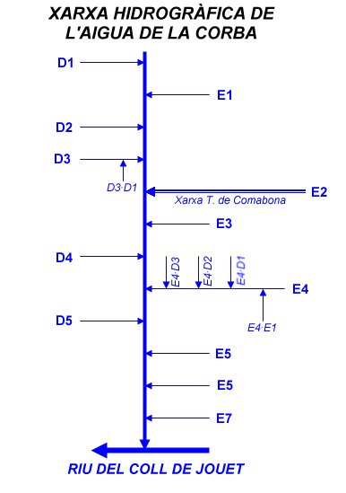 Esquema de la xarxa hidrogràfica de l'Aigua de la Corba (tributària del Riu del Coll de Jouet)